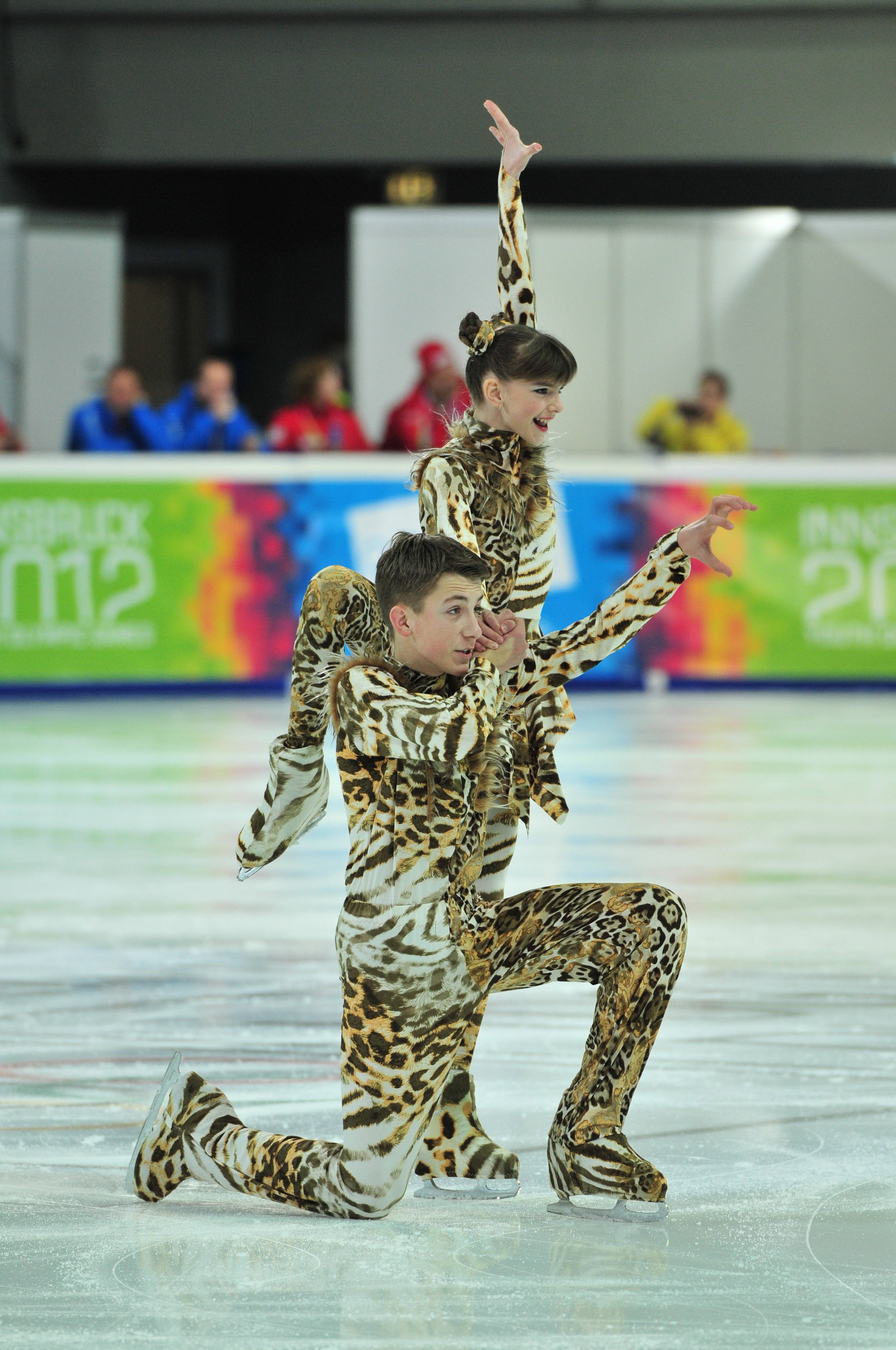 1. Jugendolympiade 2012 Innsbruck